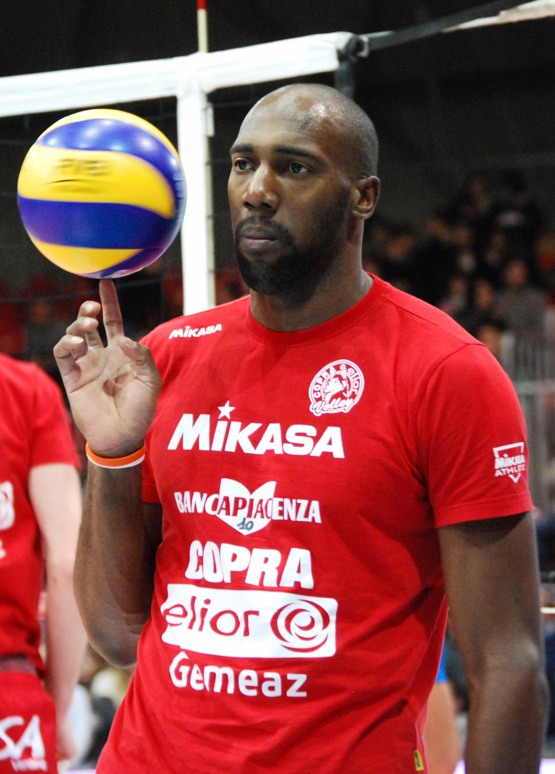 Robertlandy Simon